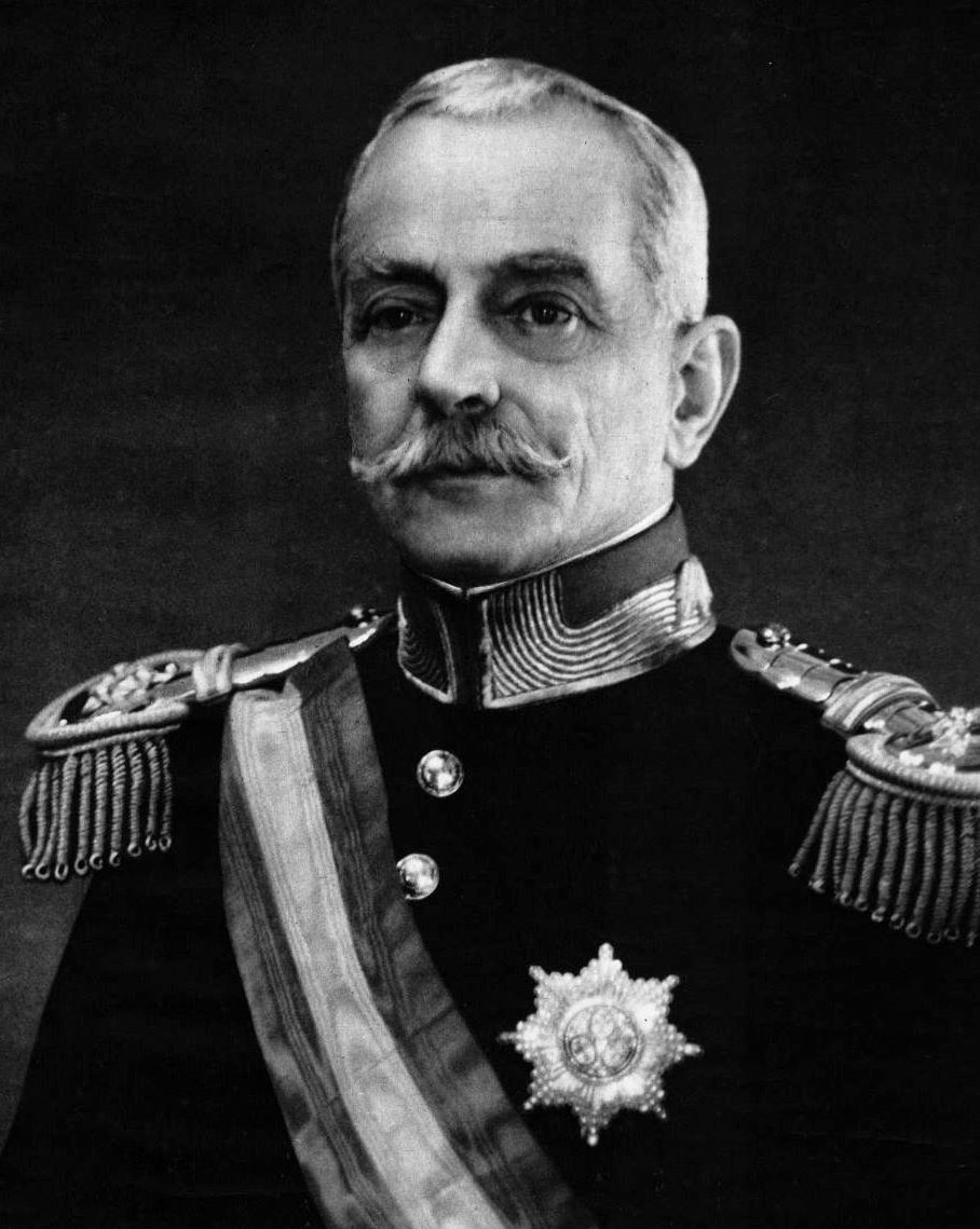 Fotografia de António Óscar de Fragoso Carmona, Presidente da República Portuguesa entre 1926 e 1951.